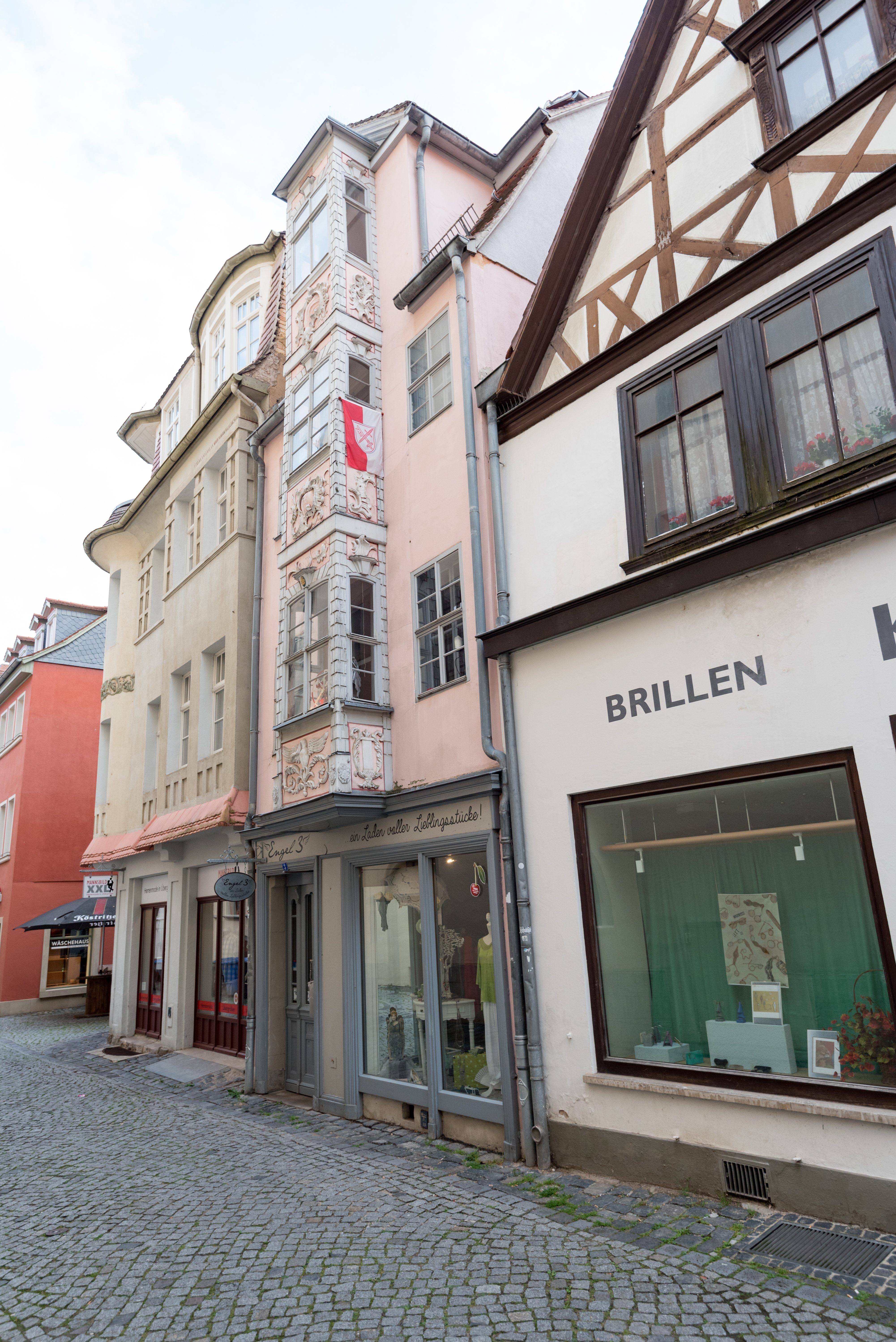 Naumburg (Saale), Engelgasse 3